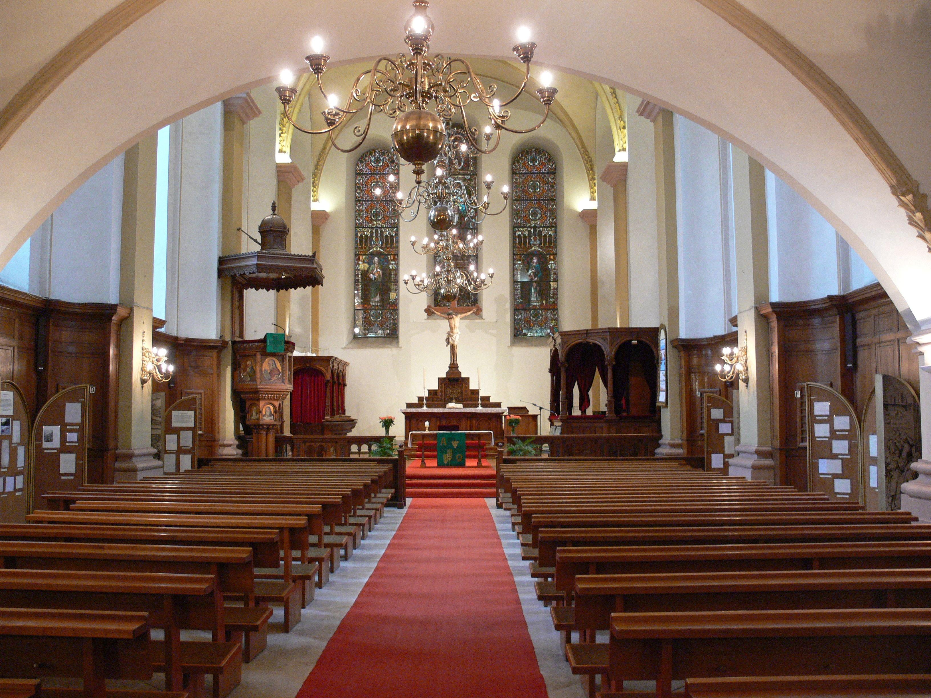 Dreifaltigkeitskirche der Protestantischen Kirche im Großherzogtum Luxemburg; Gemeinde Luxemburg-Stadt